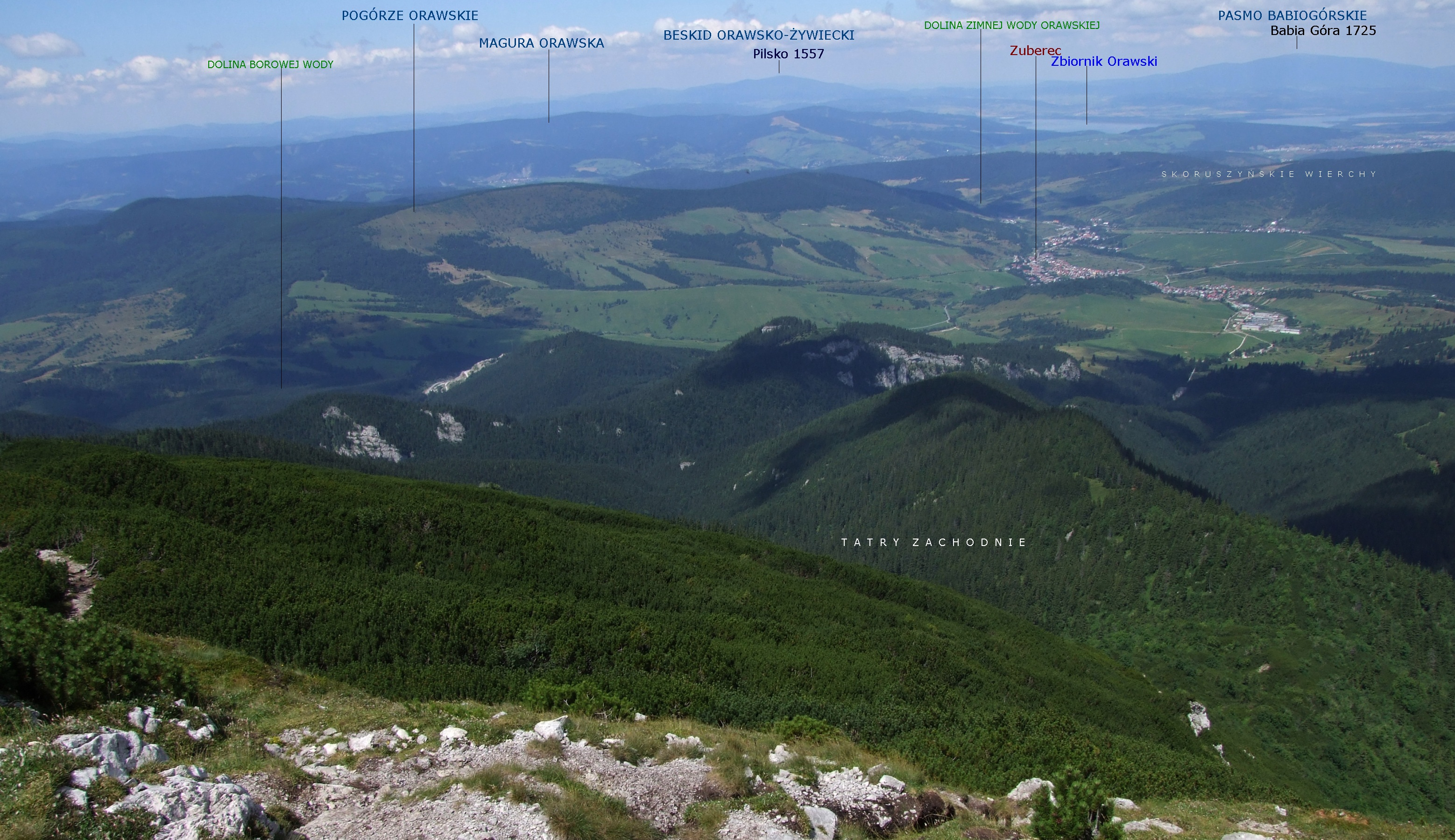 Widok na północną stronę z Siwego Wierchu (Tatry Zachodnie)